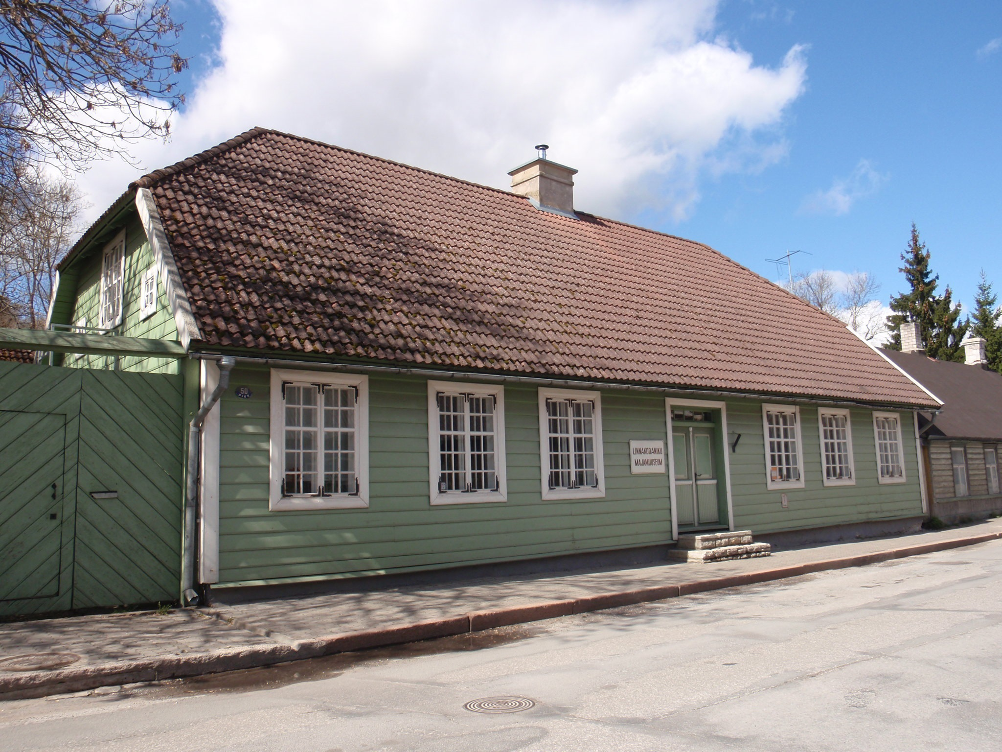 Linnakodaniku Majamuuseum Rakveres